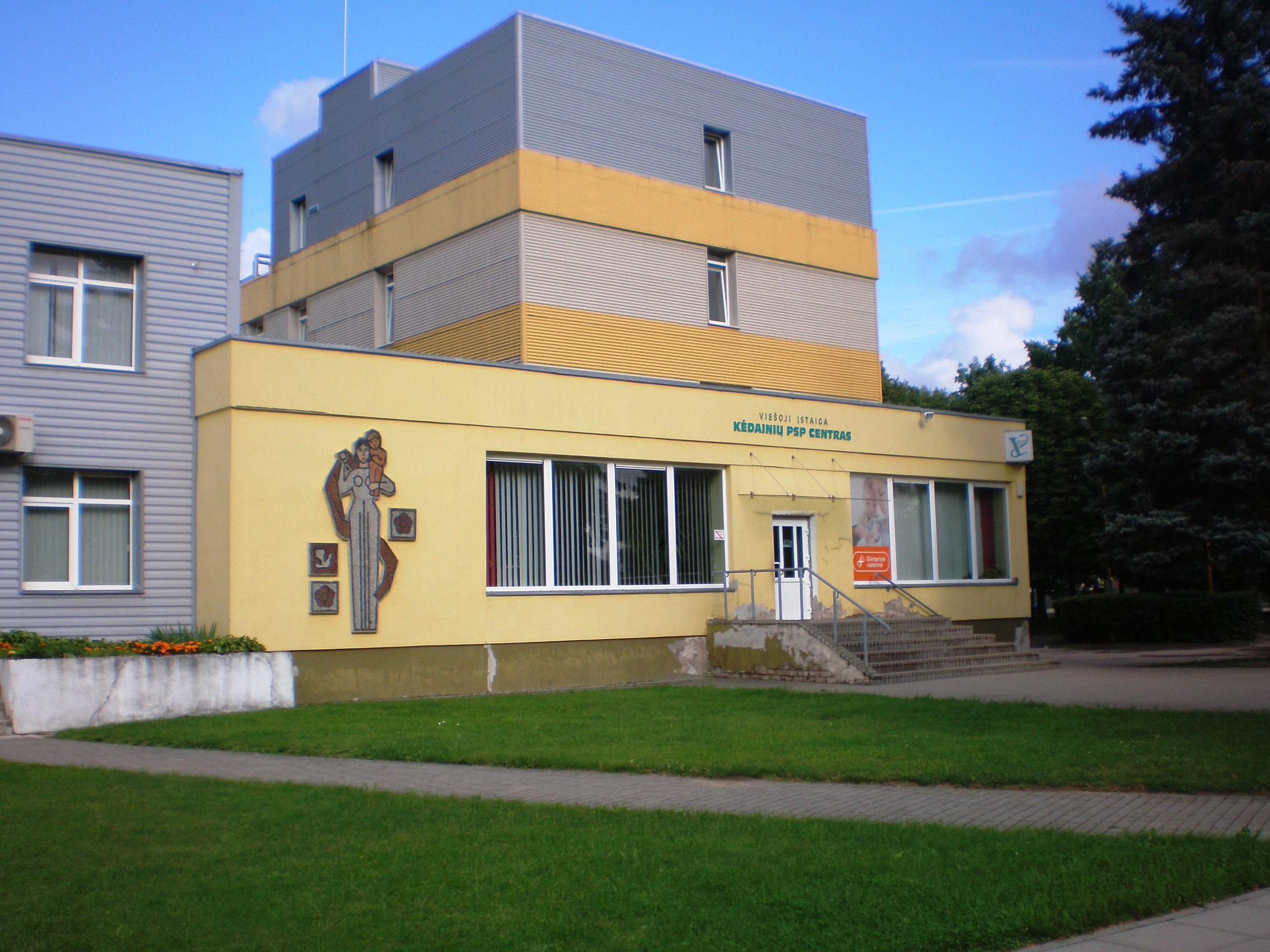 Kėdainių ligoninės vaikų skyrius